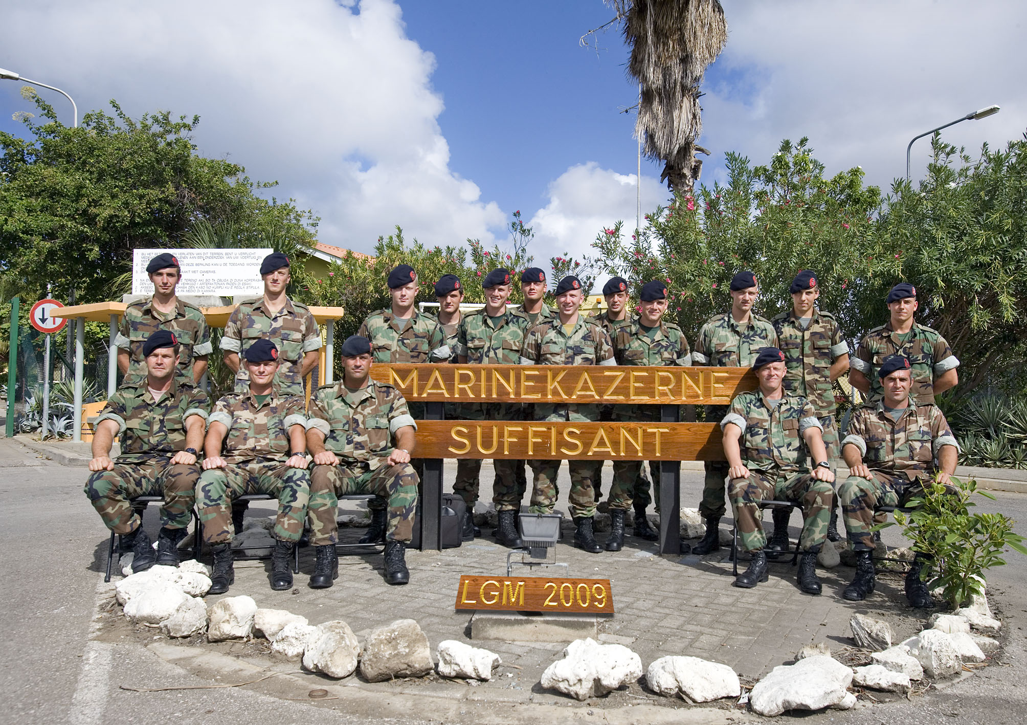 Opleiding Mariniers1 MLI op Curacao Marinekazerne Suffisant